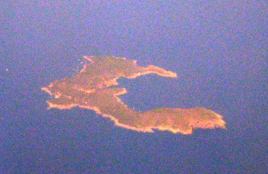 Die Insel Giannutri von Süden gesehen.